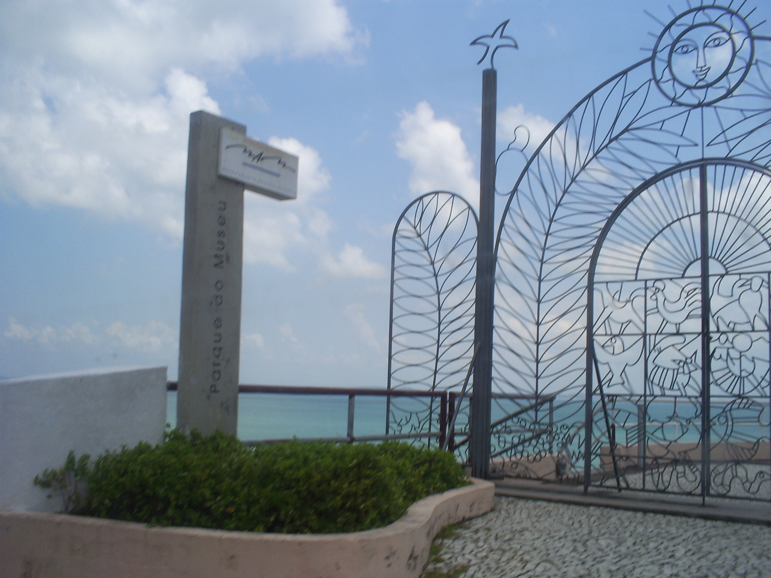 Parque das Esculturas de Mário Cravo próximo ao Solar do Unhão, Salvador, Bahia, Brasil.